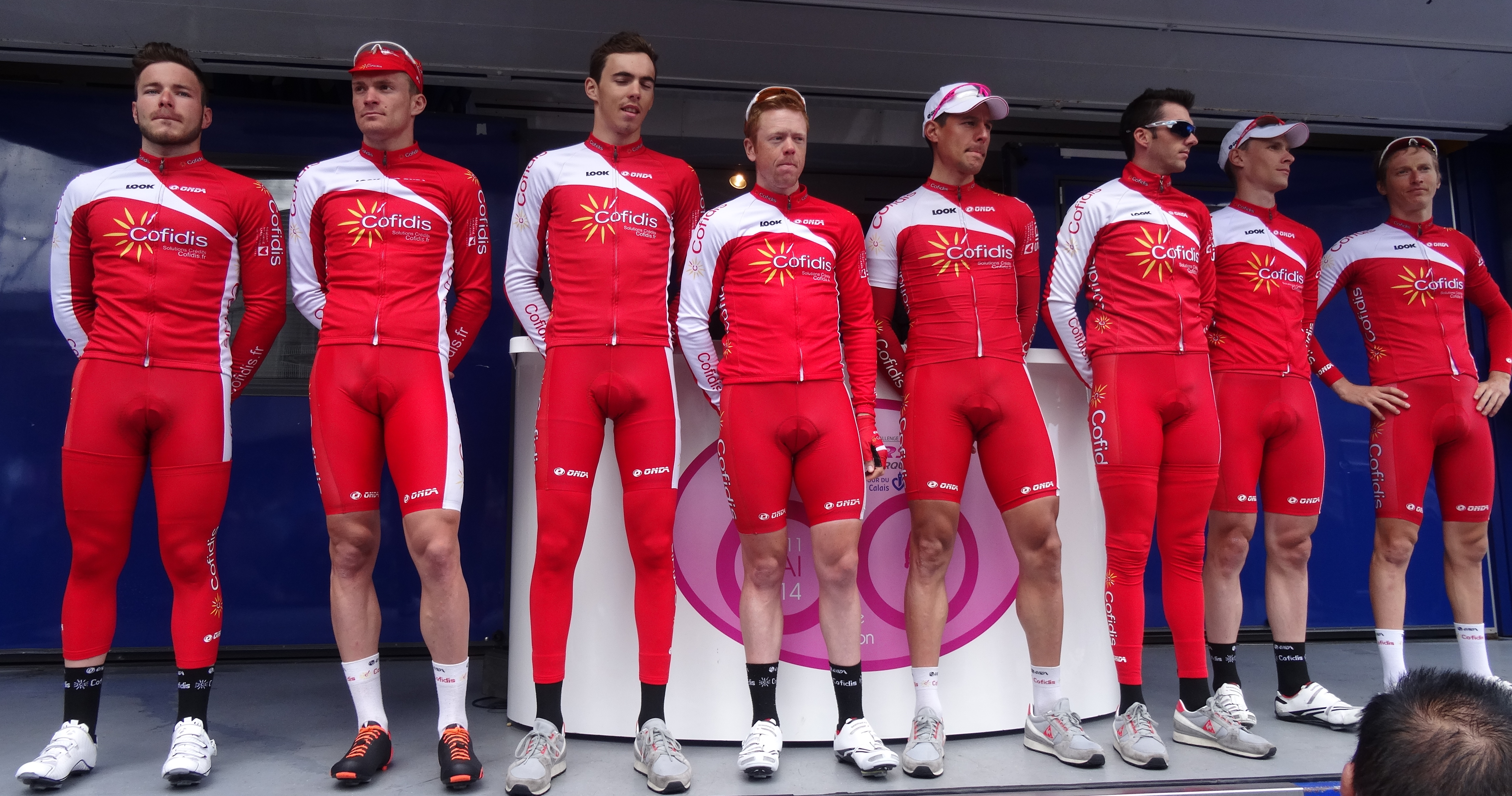 Reportage photographique réalisé le mercredi 7 mai 2014 au départ de la première étape de l'édition 2014 des Quatre jours de Dunkerque à Dunkerque, Nord, Nord-Pas-de-Calais, France. Depicted people: Florian Sénéchal, Adrien Petit, Christophe Laporte, Romain Zingle, Stéphane Poulhiès, Edwig Cammaerts, Julien Fouchard and Guillaume Levarlet Depicted team: Cofidis